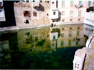 Imagen antigua de la balsa de la sociedad de aguas